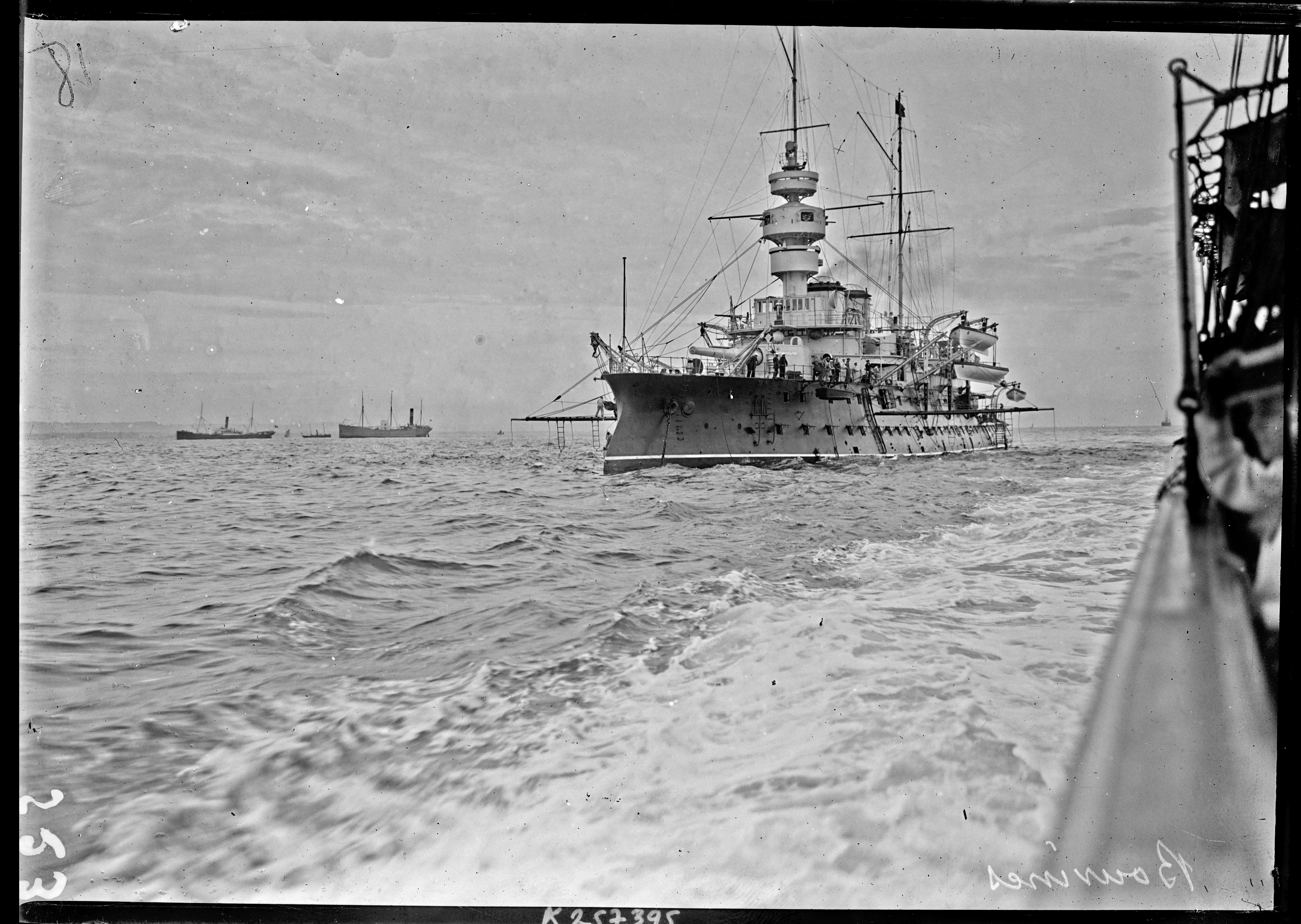 Visite de l'escadre anglaise, le 10 juillet 1905 : Bouvines en rade de Brest.